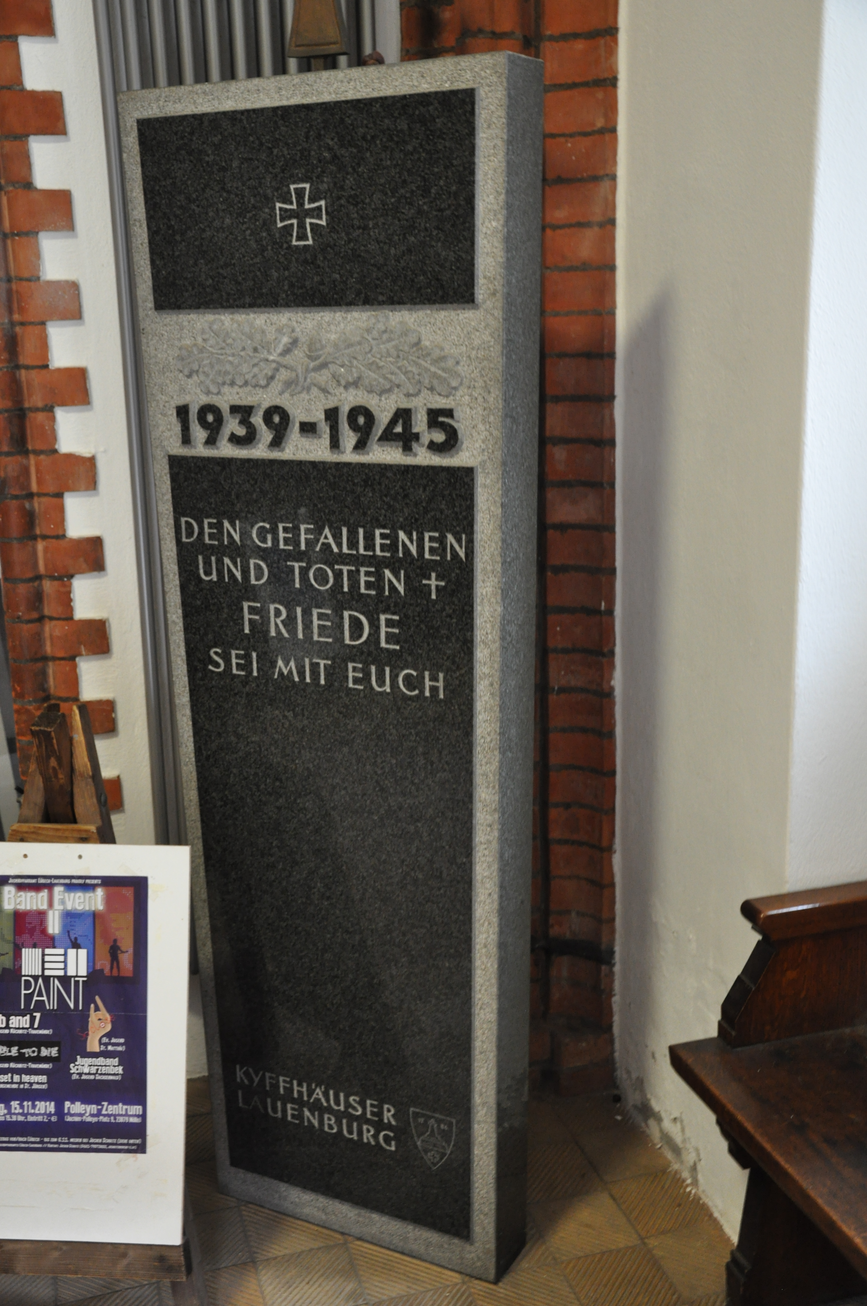 Lauenburg, Maria-Magdalenen-Kirche, Gefallenendenkmal 2. Weltkrieg